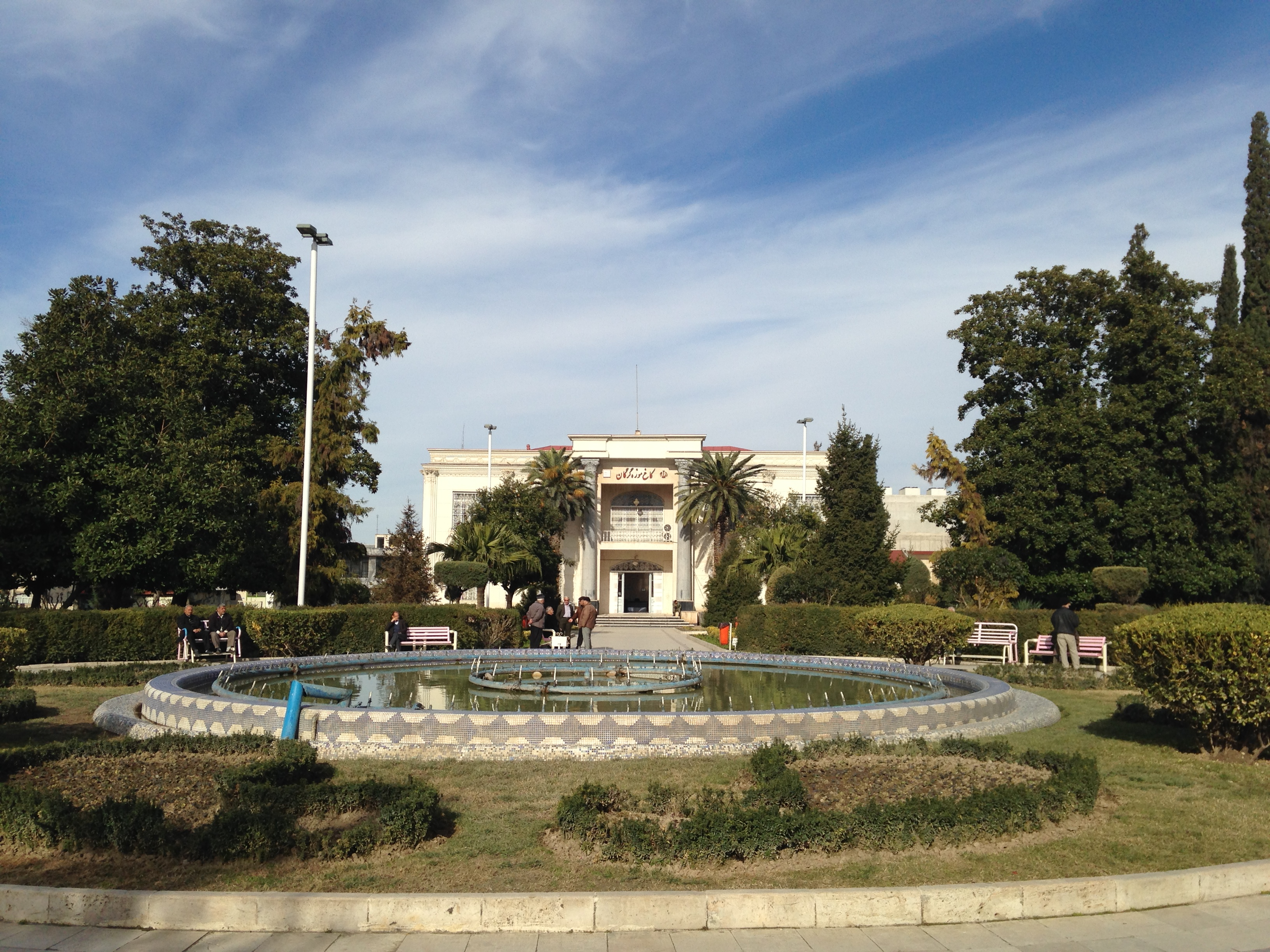 کاخ اختصاصی گرگان